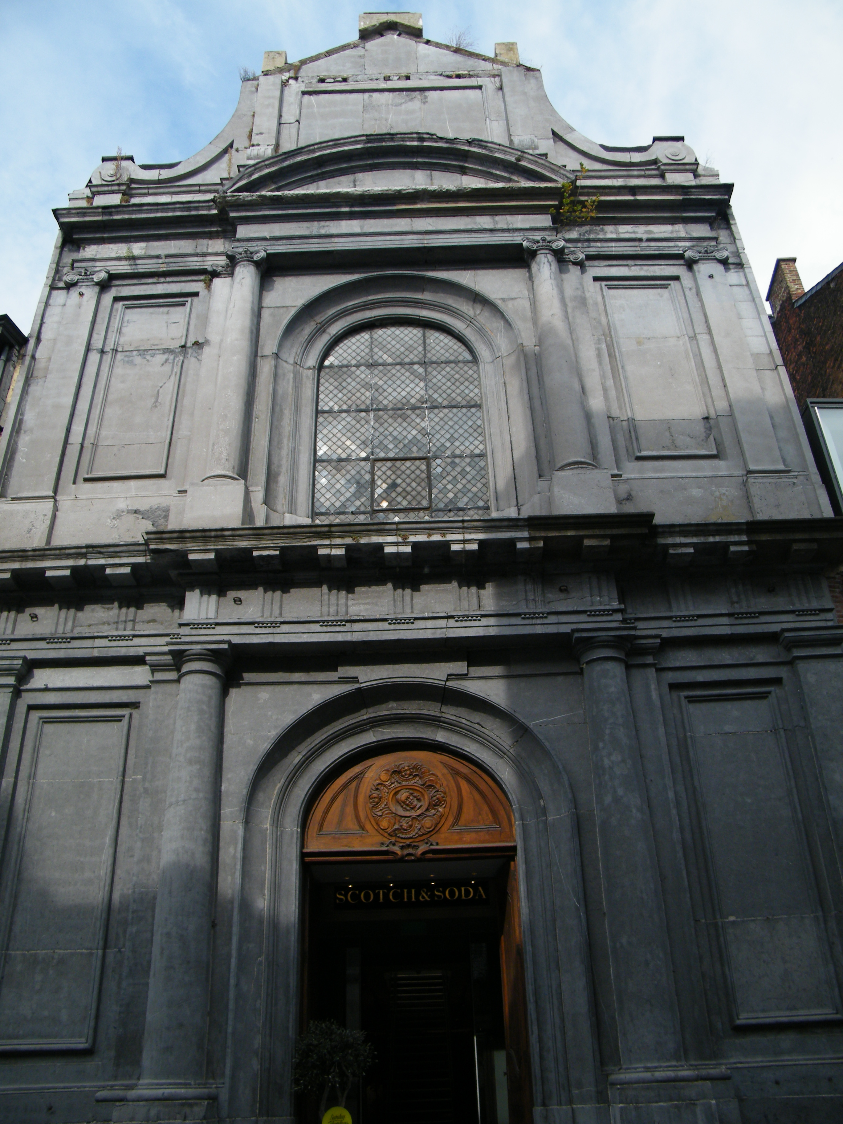 Église Saint-Jacques